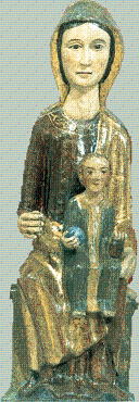 Virgen de Villaverde, conocida como "La Verdosina". Huerga de Garaballes.